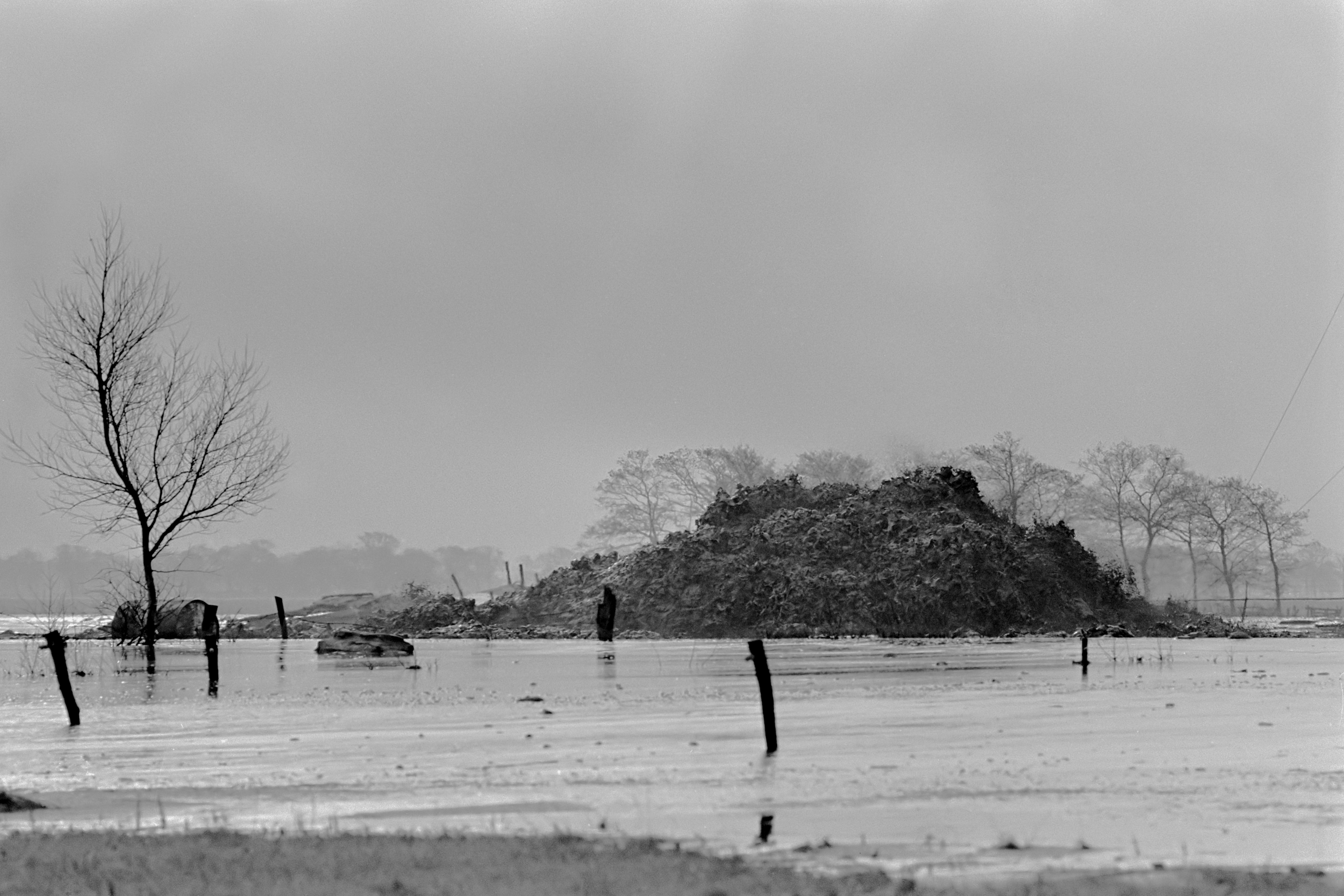 Gaseruptie bij Sleen; het ondergelopen gebied rondom de krater 3 december 1965